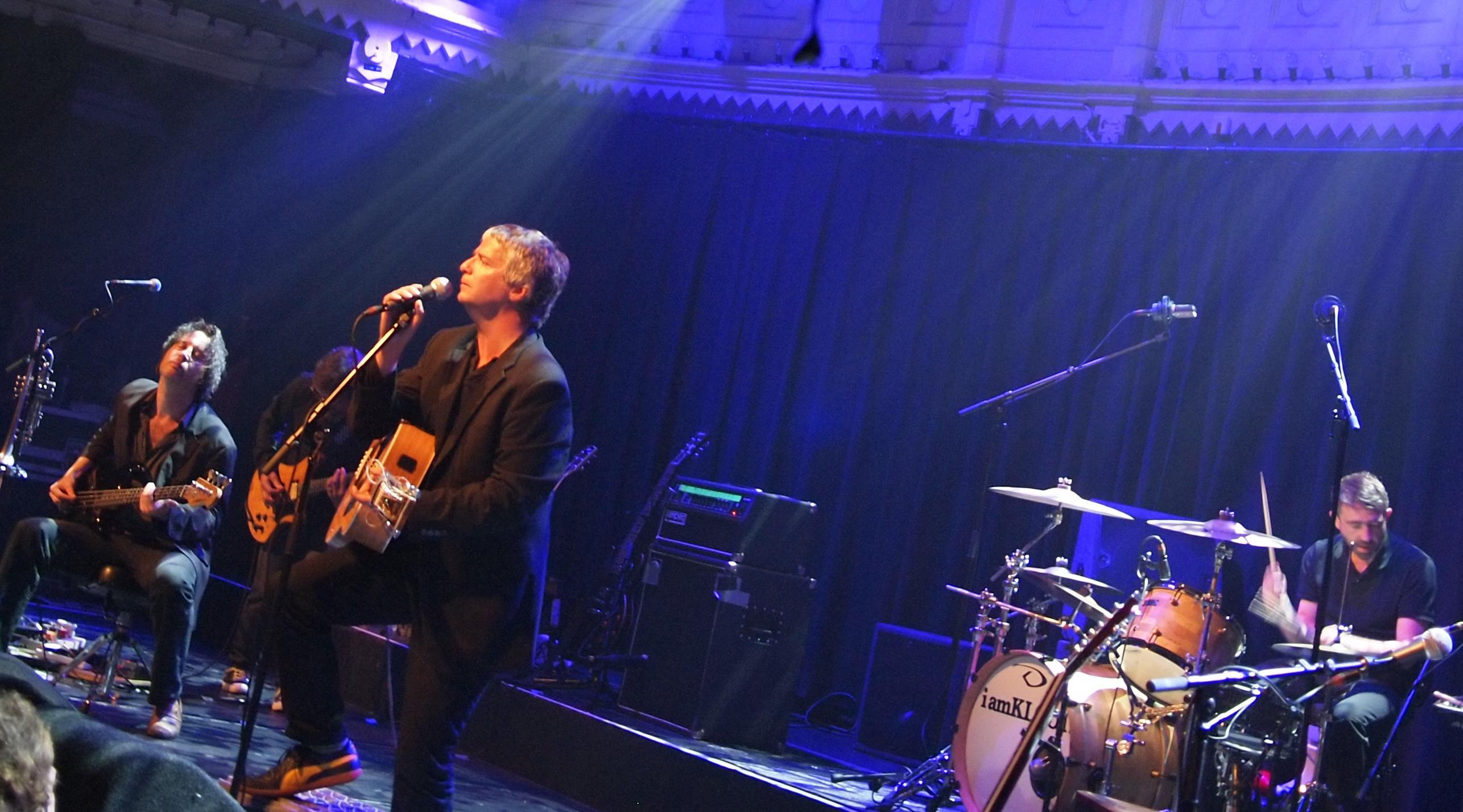 I am Kloot live @ Paradiso Amsterdam, 6.8.2011